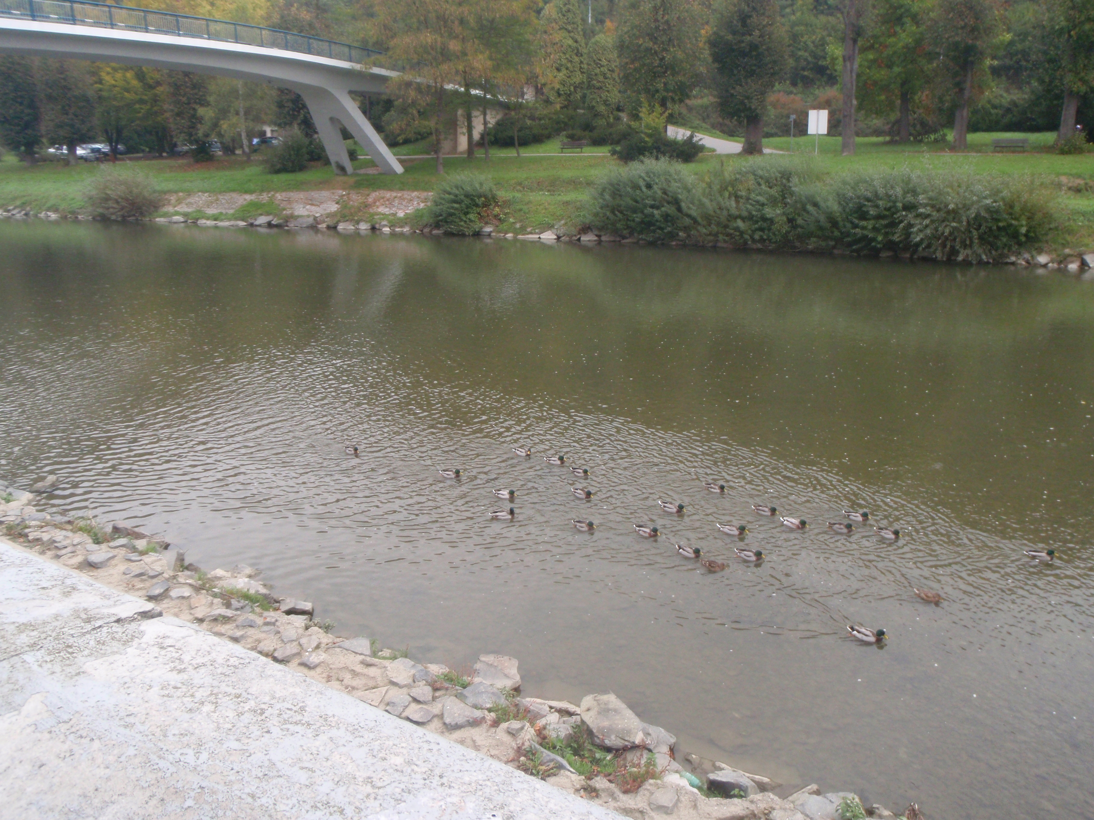 Bečva